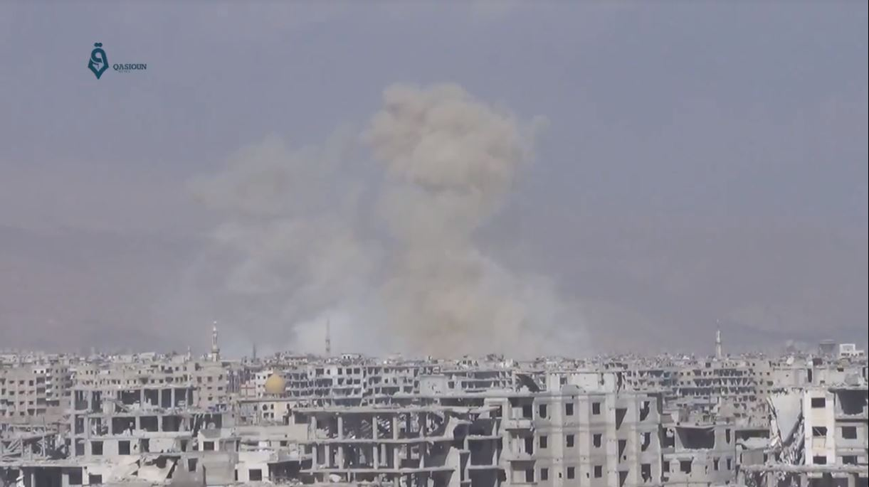 Frappes aériennes sur la Ghouta orientale, le 22 février 2018.